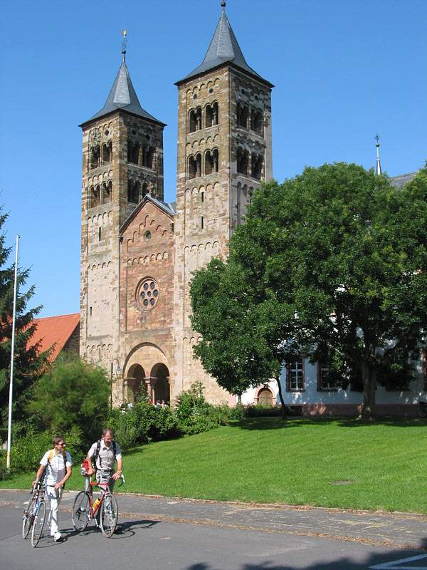 Kirchtürme des ehemaligen Prämonstratenserklosters Ilbenstadt